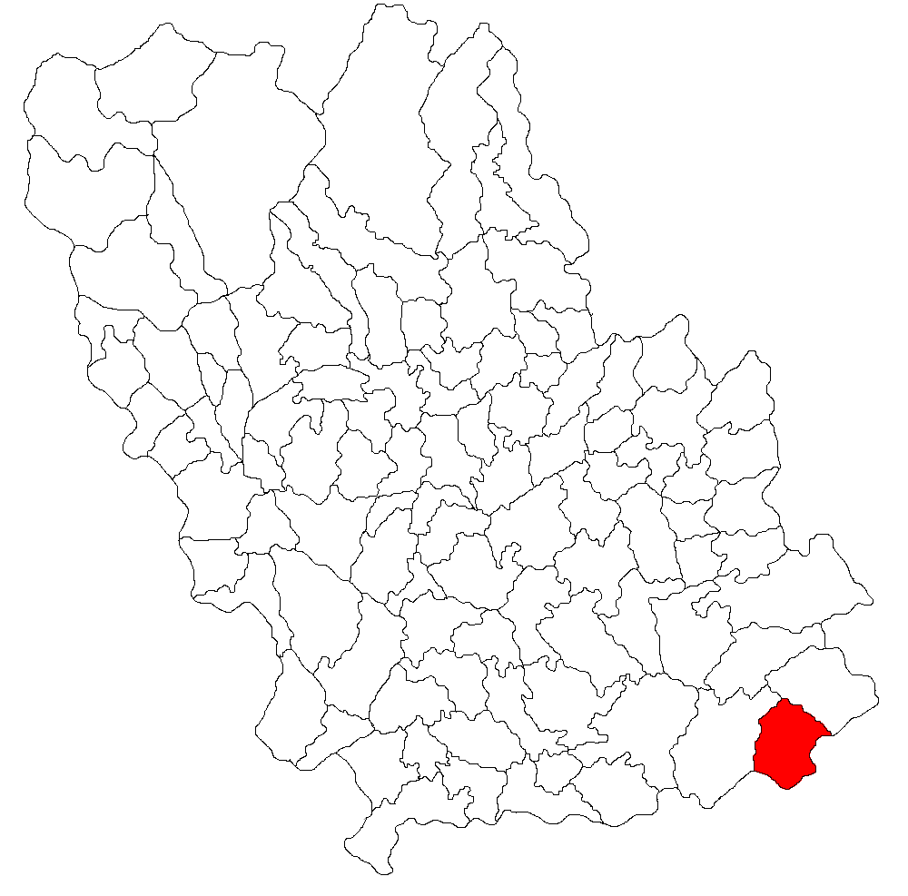 Categorie:Hărţi ale judeţului Prahova